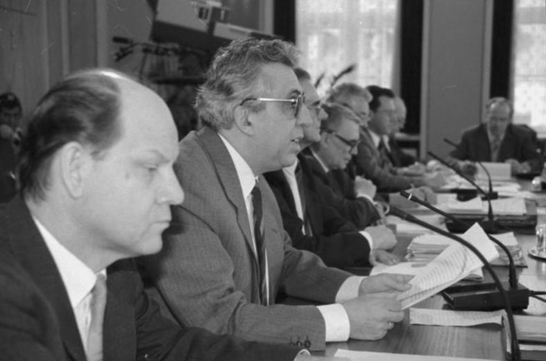 Berlin, Egon Krenz beim Rundem Tisch ADN-ZB/Mittelstädt/22.1.1990/Berlin: 9. Runder Tisch. Die ehemaligen Politbüromitglieder und in dieser Tätigkeit für Sicherheitsfragen zuständigen Egon Krenz (2. v. l.) und Wolfgang Herger (l) nahmen zu den Beziehungen der ehemaligen SED und dem Sicherheitsapparat Stellung. Abgebildete Personen: Krenz, Egon: Vorsitzender der FDJ, Generalsekretär des ZK der SED, Staatsratsvorsitzender, DDR Herger, Wolfgang Dr. phil.: Mitglied des ZK der SED, Volkskammerabgeordneter, FDJ, DDR